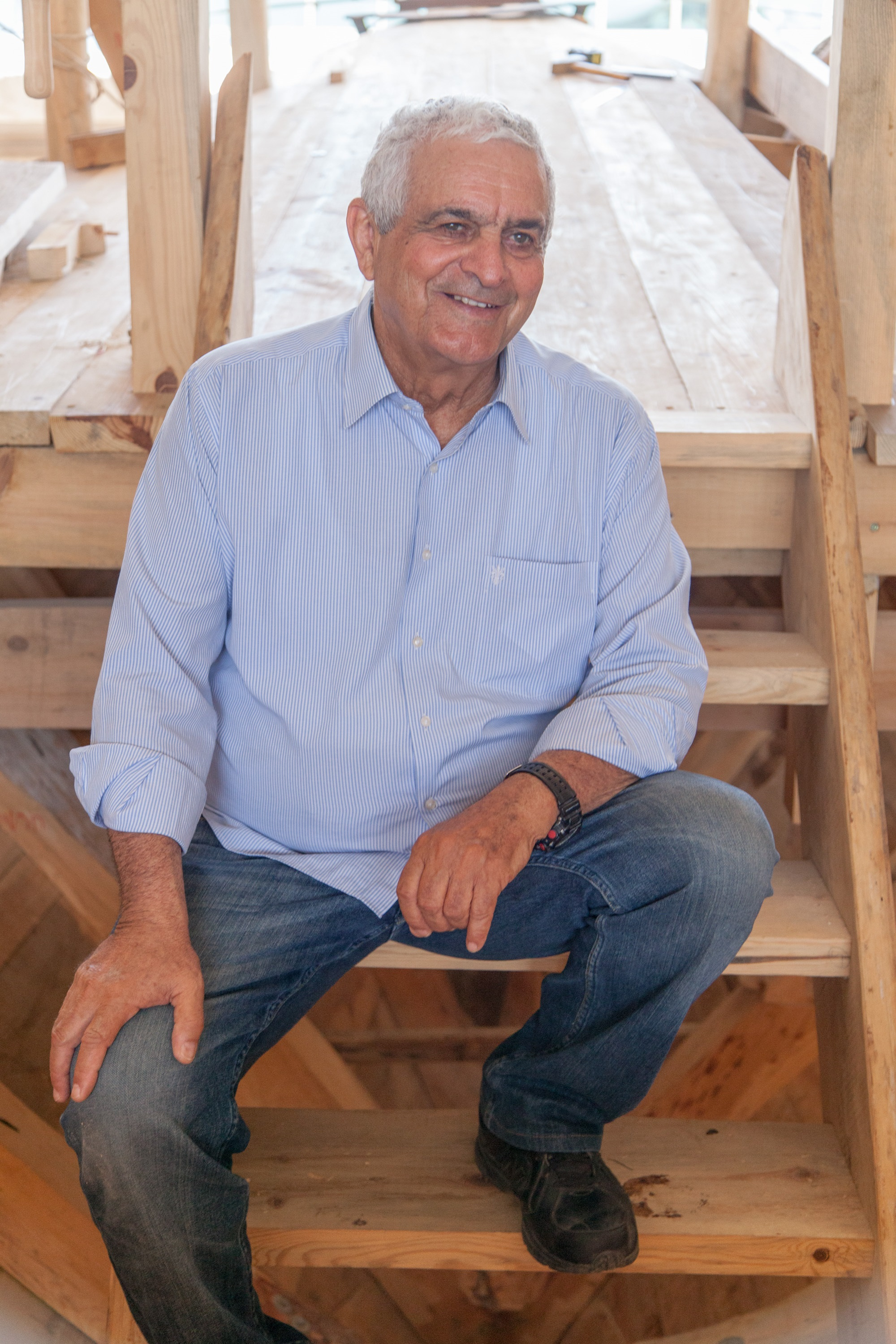 פרופסור יעקב כהנוב יוני 2016.